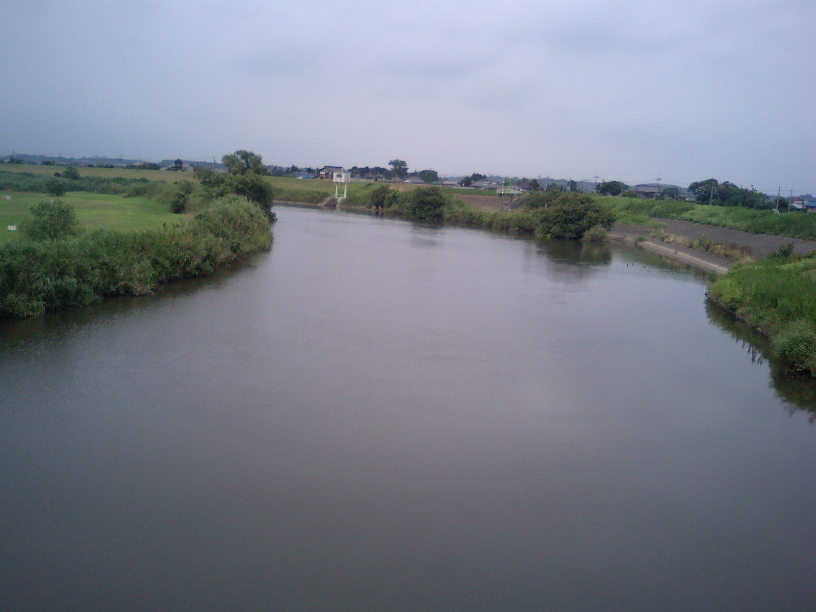 小貝川上流方面（茨城県取手市にて撮影）